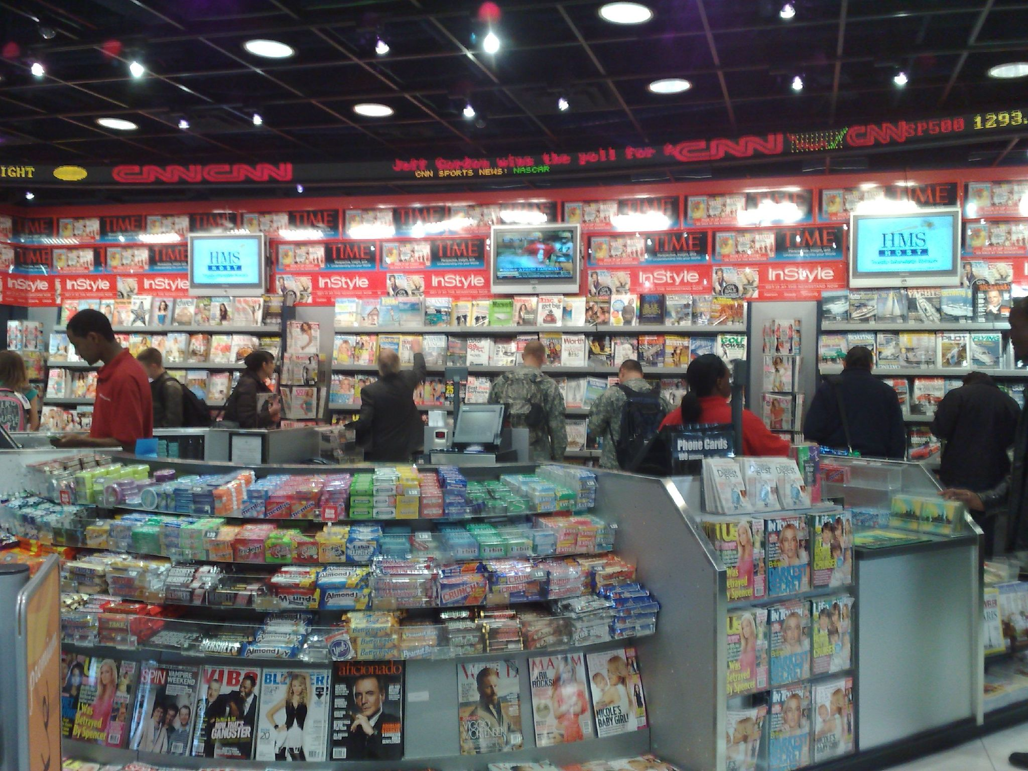 edicola